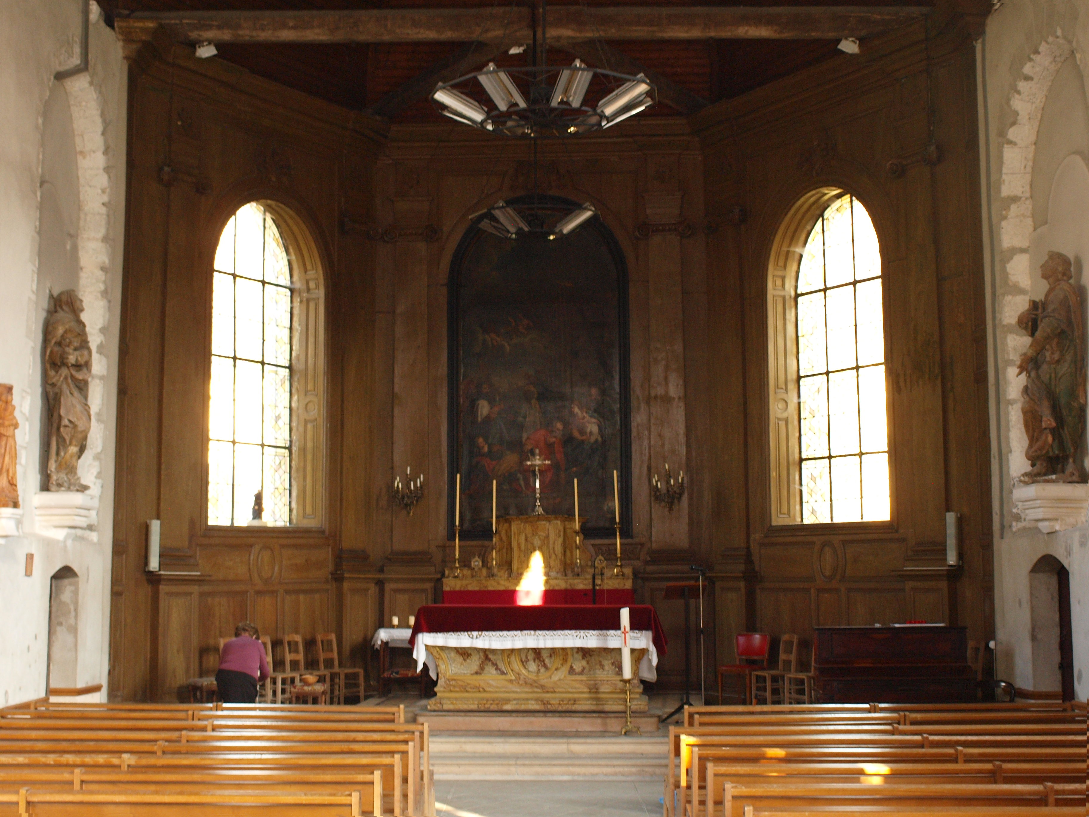 Paron (Yonne, France) ; intérieur de l'église Saint-Bond